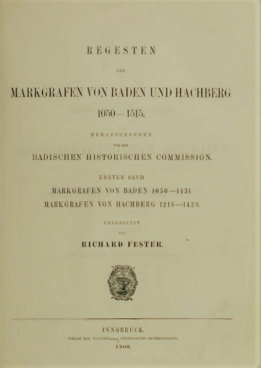 Titelblatt des ersten Bandes der Regesten der Markgrafen von Baden und Hachberg 1050–1515. Badische Historische Kommission (Hrsg.), Verlag der Wagnerschen Universitäts-Buchhandlung, Innsbruck 1900